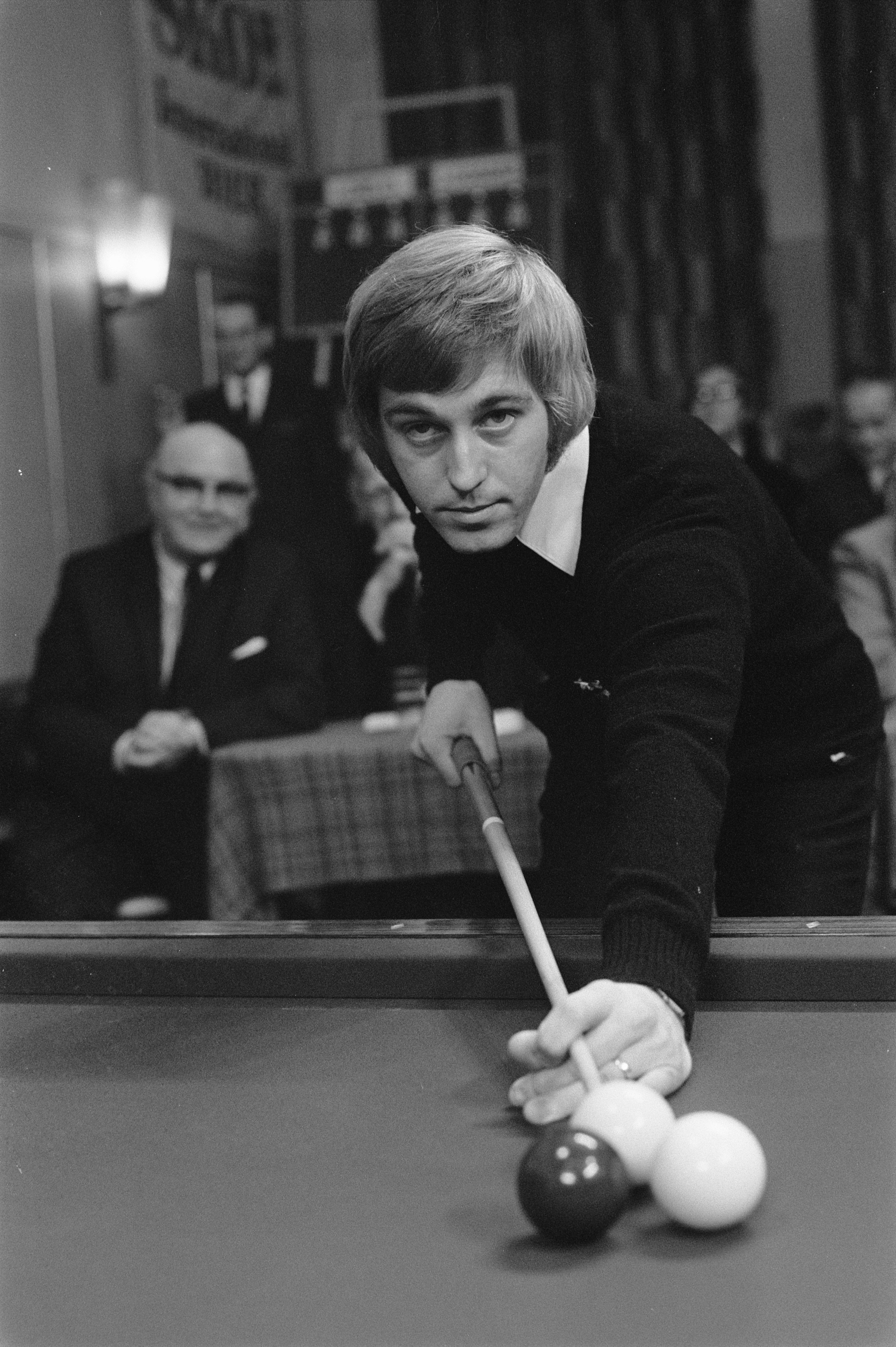 Collectie / Archief : Fotocollectie Anefo Reportage / Serie : [ onbekend ] Beschrijving : Driebanden biljarten Interland, Nederland tegen Belgie, nummer 13 en 14 Rini van Bracht , nummer 15 Ceulemans (kop en nummer 16 J. Doggen (kop) Datum : 4 november 1972 Trefwoorden : BILJARTEN Persoonsnaam : rini van bracht Fotograaf : Peters, Hans / Anefo Auteursrechthebbende : Nationaal Archief Materiaalsoort : Negatief (zwart/wit) Nummer archiefinventaris : bekijk toegang 2.24.01.05 Bestanddeelnummer : 926-0017